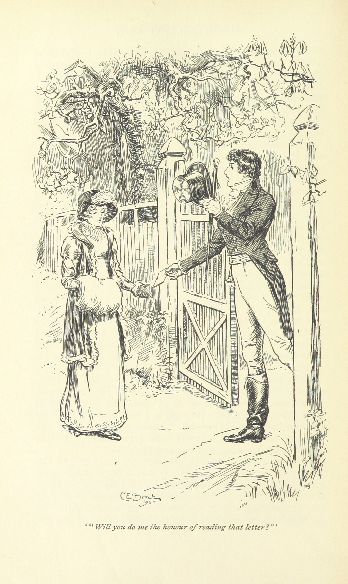 Illustration de C. E. Brock pour Pride and Prejudice (Edition MacMillan & C°, ch.35) Darcy remet sèchement sa lettre explicative à Elizabeth.